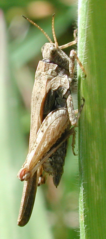 Tetrix subulata, f., Säbeldornschrecke, Weibchen, NSG Kirchwerder Wiesen, Elbmarsch bei Hamburg, Deutschland